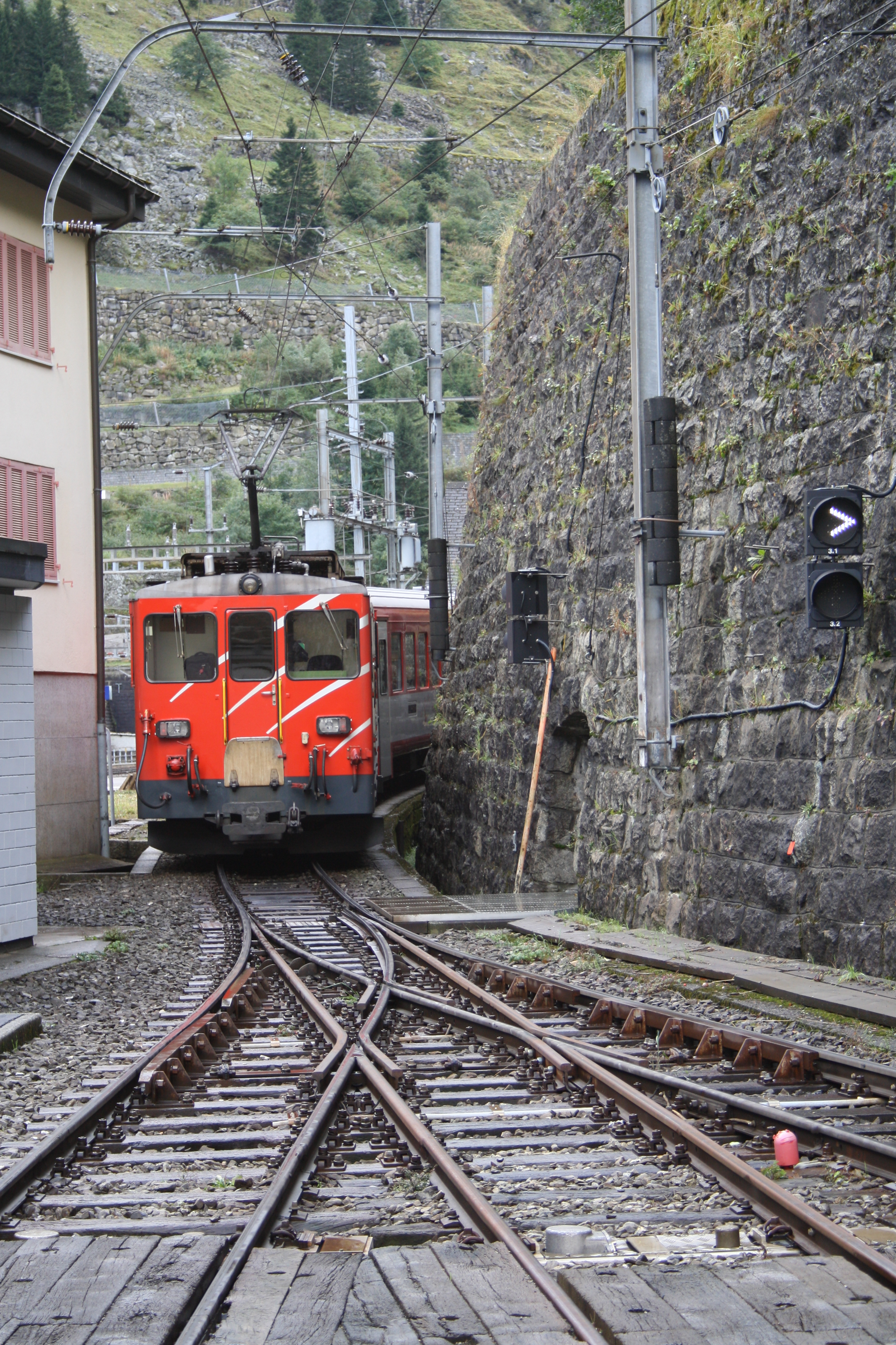 Symmetrische Doppelweiche im Schmalspurbahnhof Göschenen